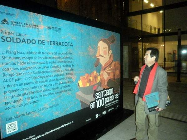 El escritor Luis Alberto Tamayo ganador de "Santiago en 100 palabras" del año 2012, junto a su cuento durante la premiación en el centro GAM.